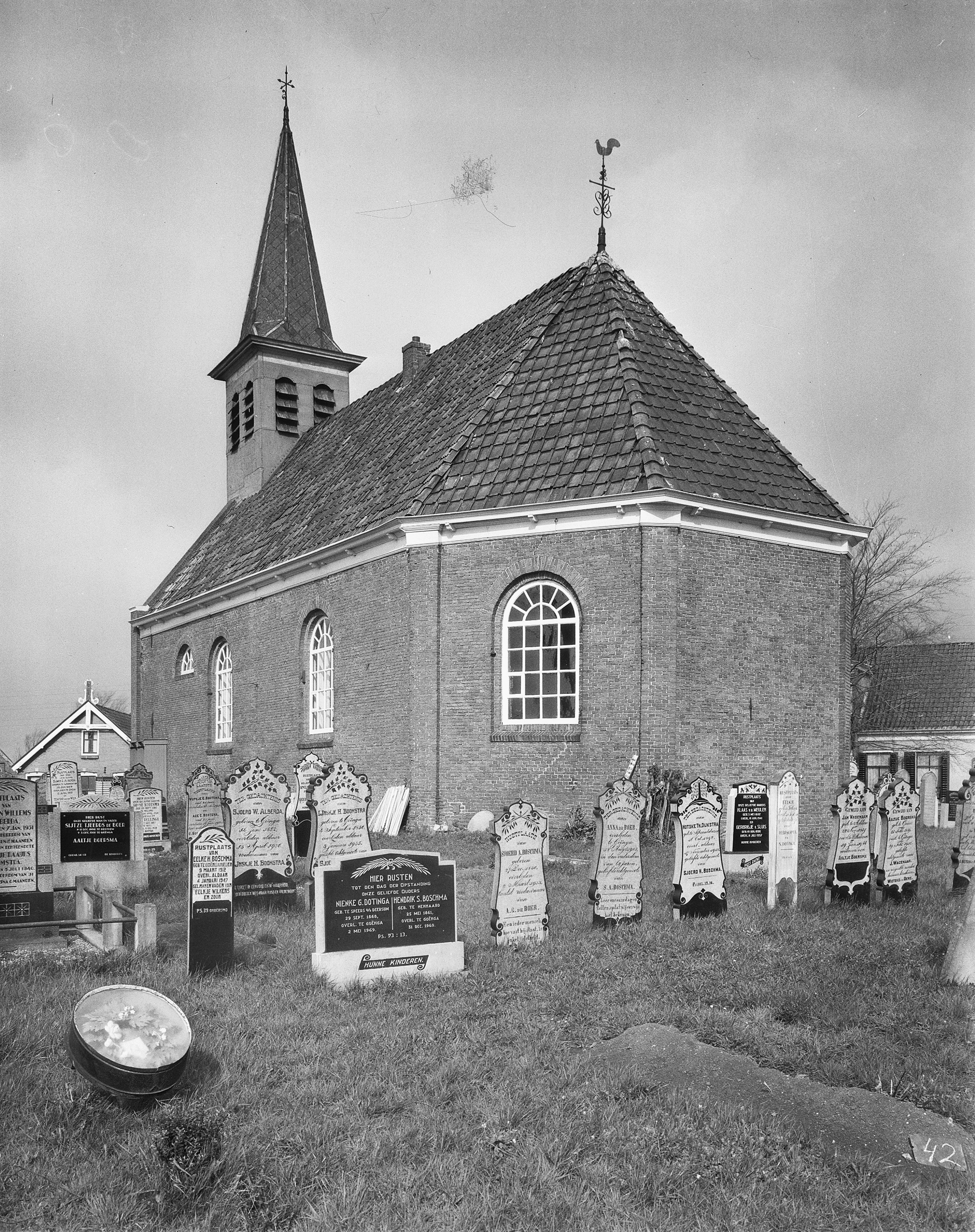 N.H.Kerk: exterieur naar het noord-westen